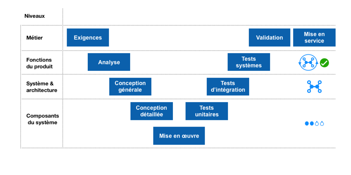 Cycle en V général par niveau de décomposition